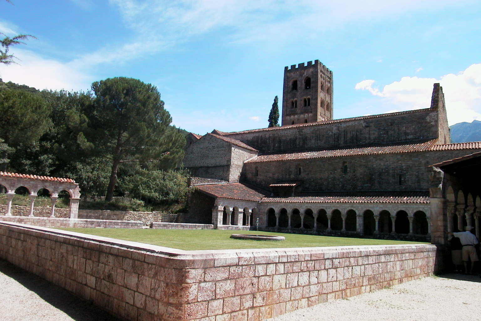 Abbaye Saint-Michel de Cuxa